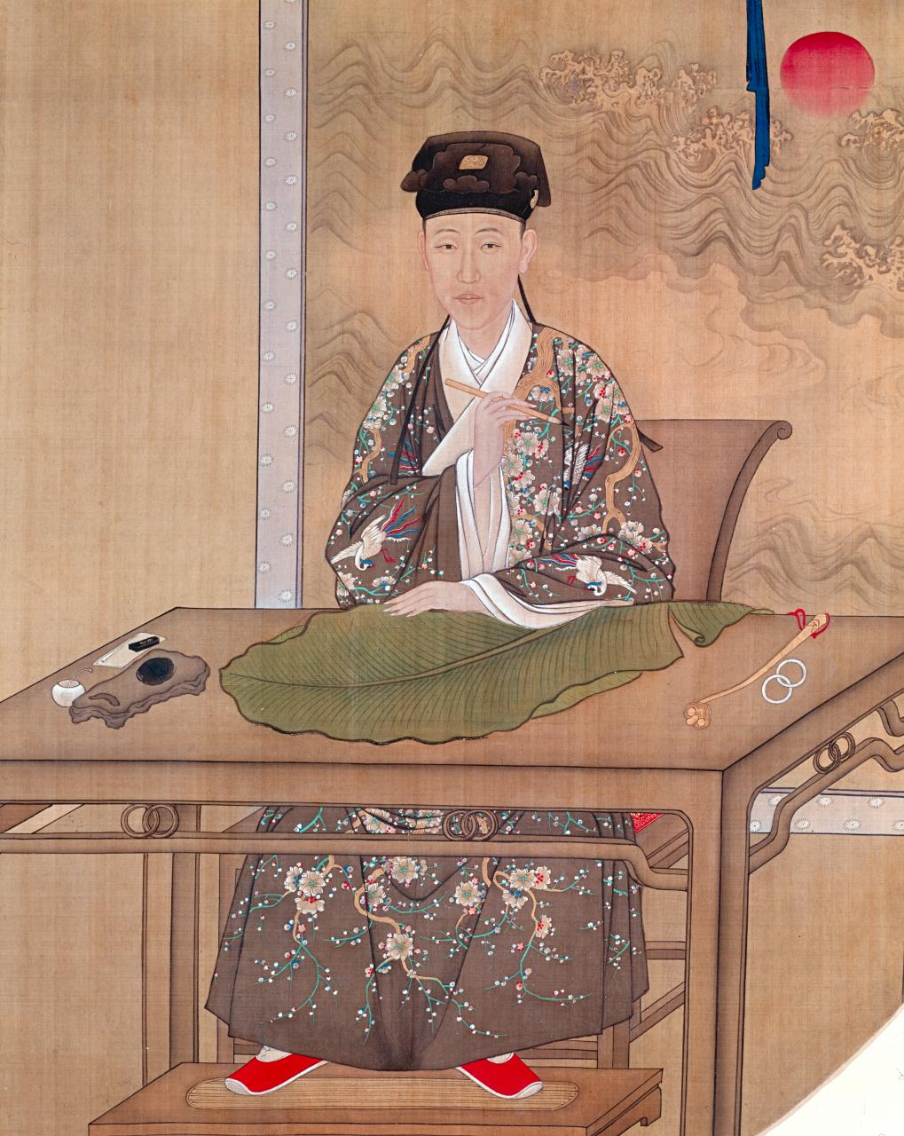 Bức họa năm 1730 mô tả hoàng tử Hoằng Lịch (愛新覺羅弘曆, 1711 - 1799) đề chữ trên lá chuối. Trứ tác nằm trong bộ tranh "hóa thân" của Ung Chính và Kiền Long.